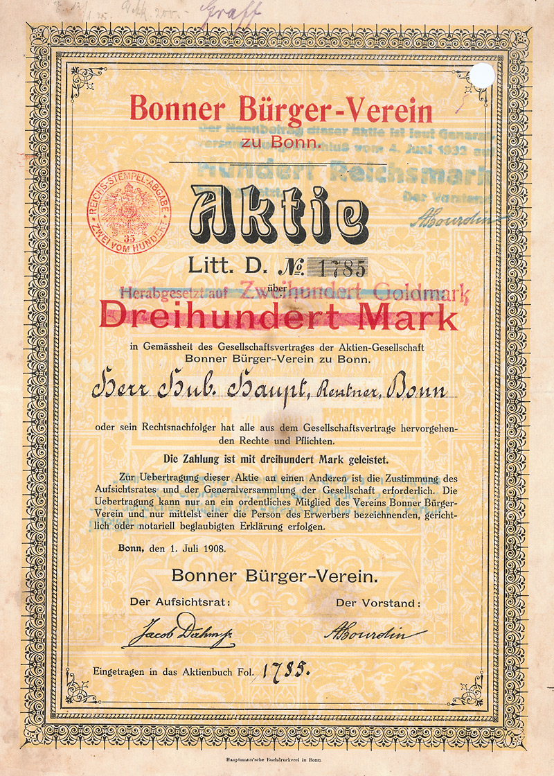 Aktie des Bonner Bürger-Vereins vom 1. Juli 1908